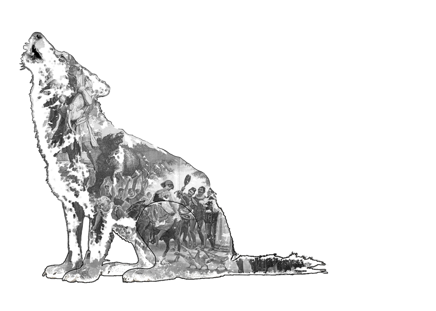 Hund und Katz - Wolf und Spatz: Tiere in der Rechtsgeschichte